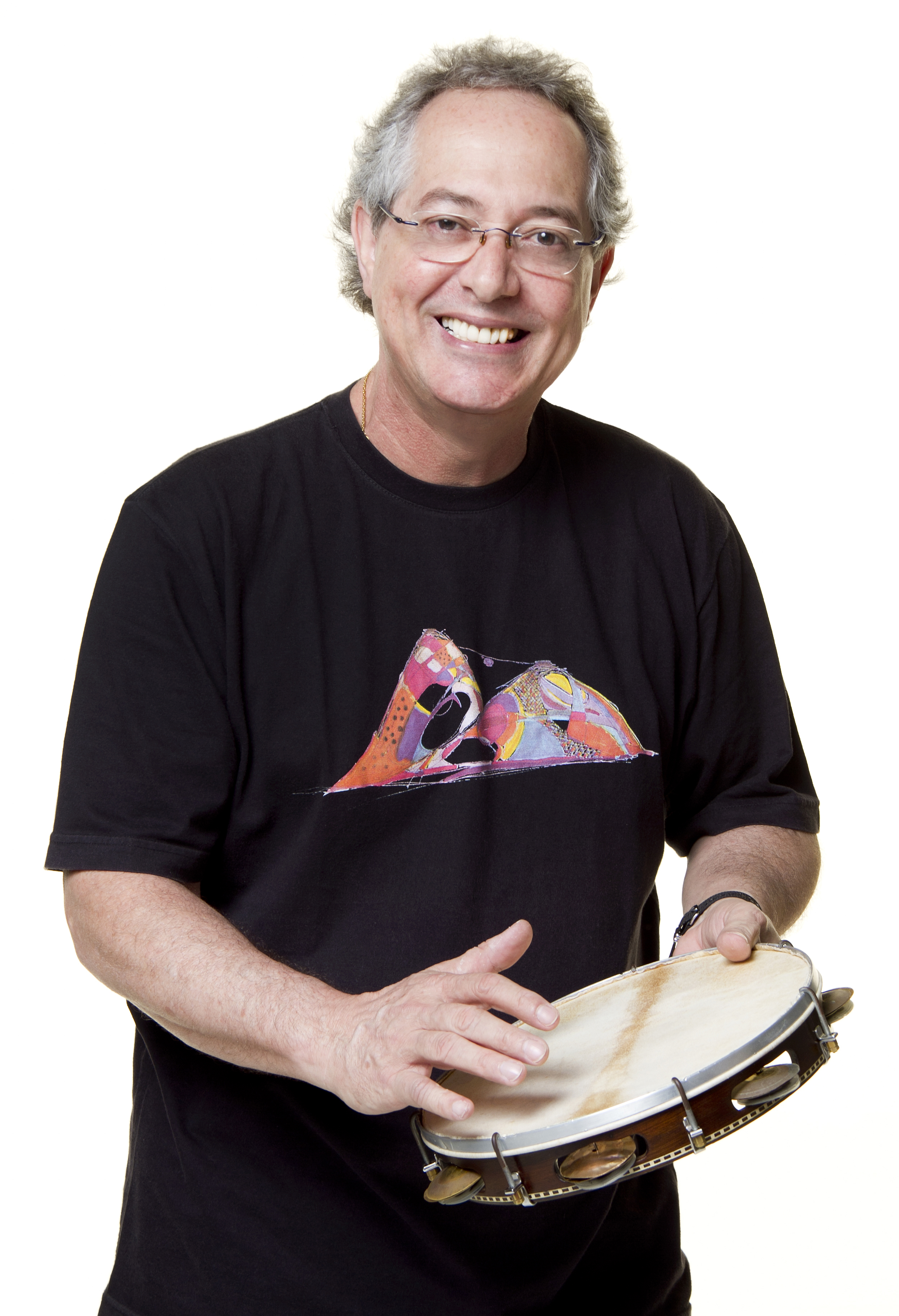 Foto Divulgação